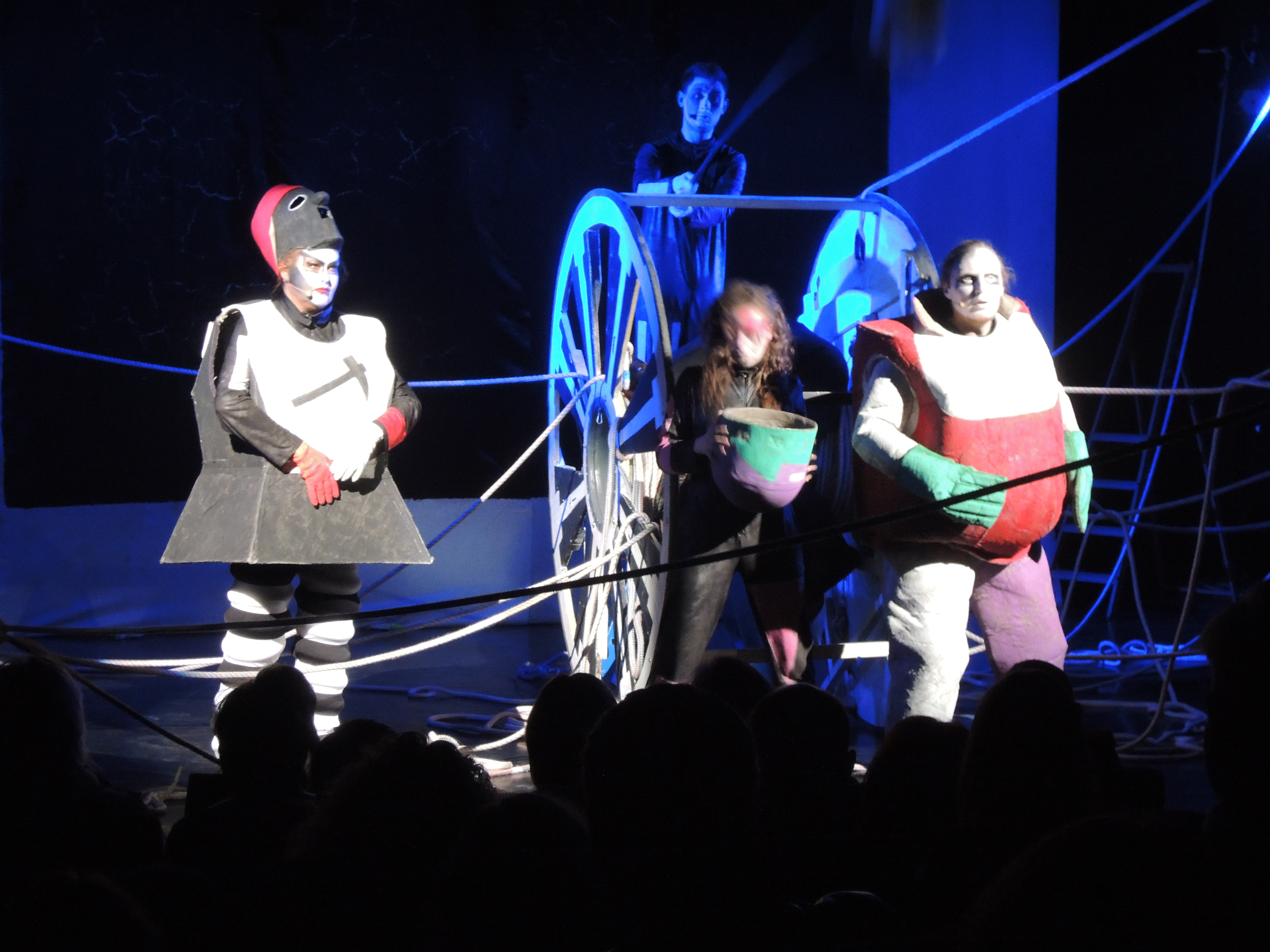 Победа над Солнцем, театр Стаса Намина, 2014